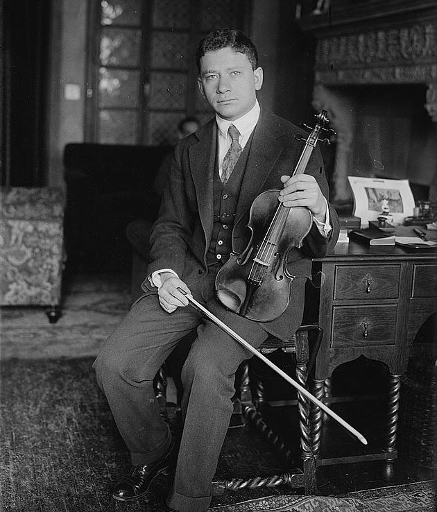 [Efrem] Zimbalist (LOC)